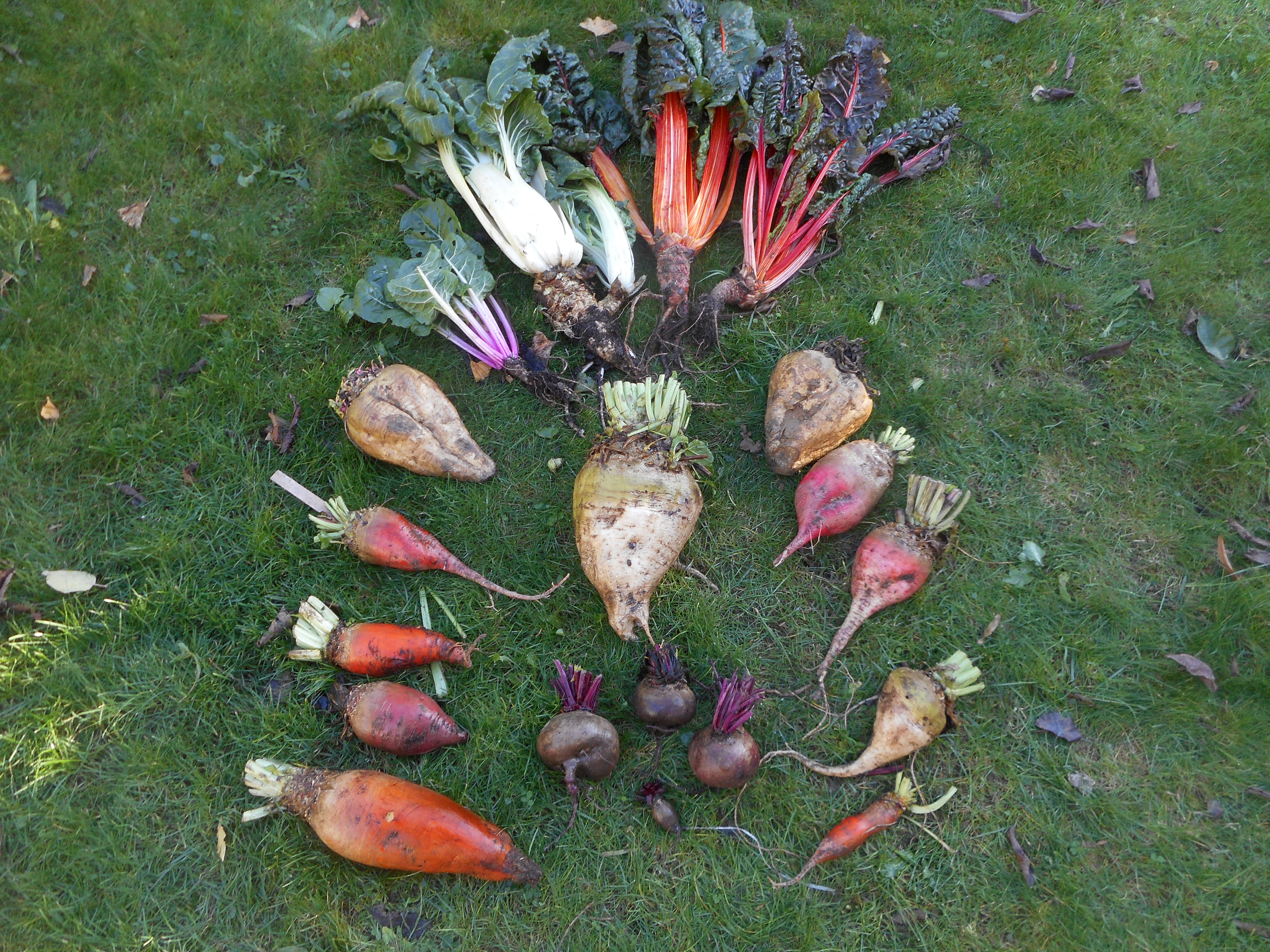 Beta vulgaris : Différentes variétés de bettes, betteraves fourragères, potagères et sucrières